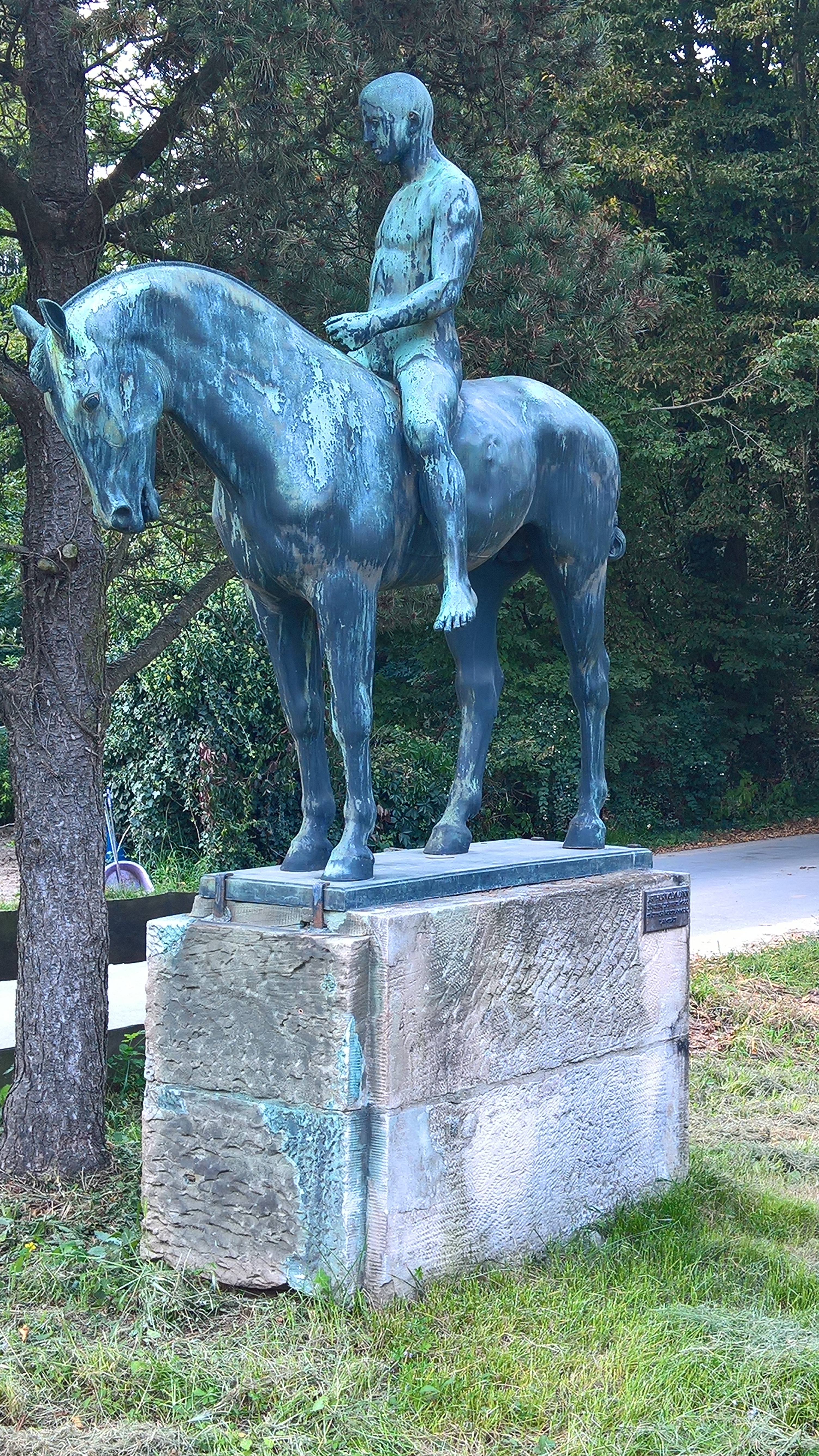 Das Hofgut Kranichstein westlich des Jagdschlosses über die Kranichsteiner Straße gelegen ist eine größere Hofanlage des 16. Jahrhunderts und wurde im 20. Jahrhundert Heimat eines Reiterhofes und hessisches Leistungszentrum Reiten. Statue "Jüngling zu Pferde", um 1900, Bildhauer Arthur Volkmann.